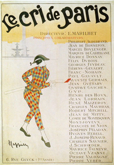 Affiche pour la revue Le cri de Paris illustrée par Leonetto Cappiello, 1901.